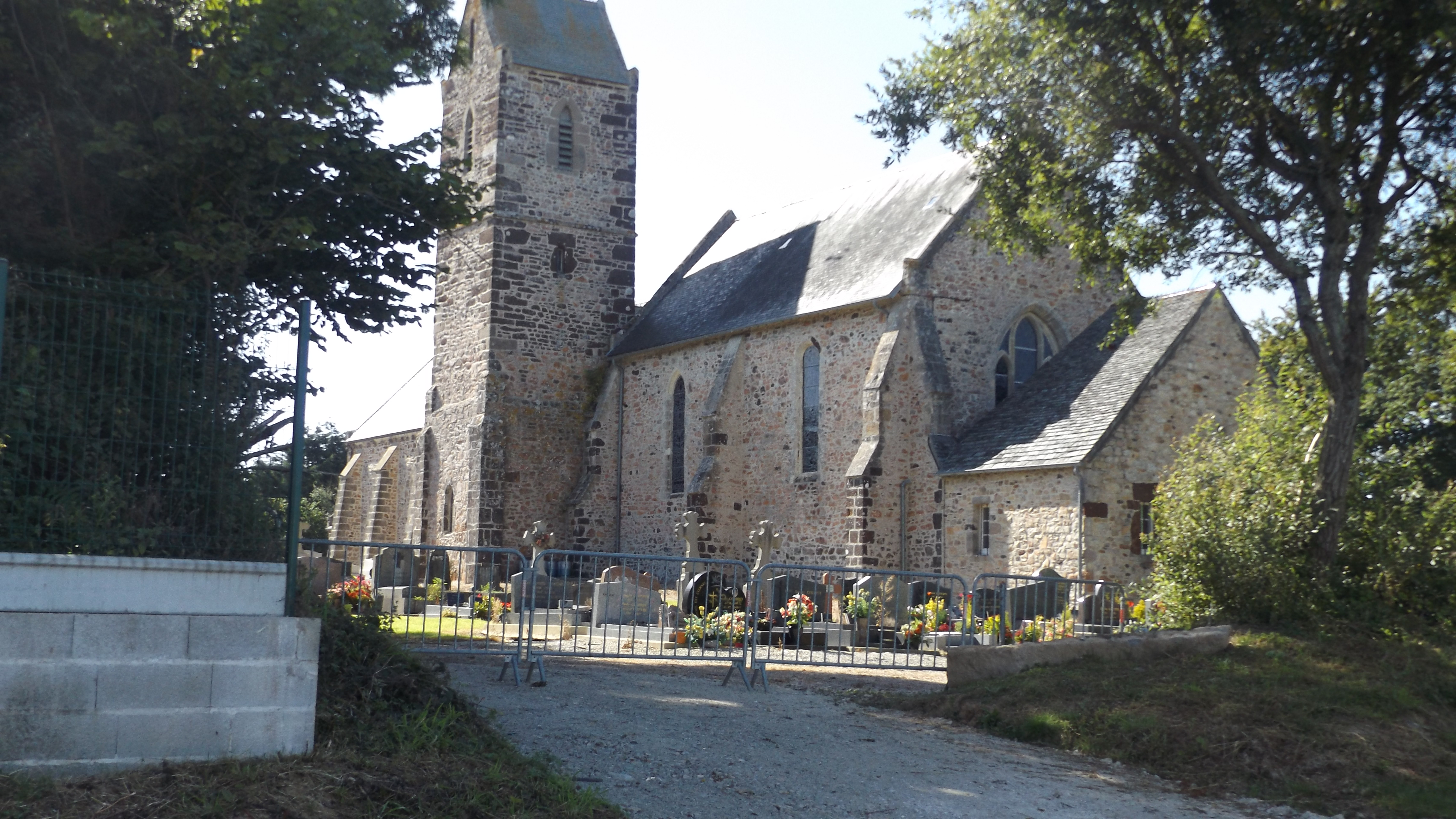 Au premier plan, entourée d'arbres, l'entrée du cimetière à aménager du côté du nouveau parking, au second plan le cimetière et au fond l'arrière de l'église avec le clocher à gauche et la sachristie à droite